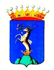 Wappen der Grafen von Sandor.